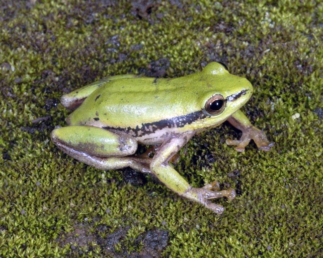 Hyperolius kivuensis